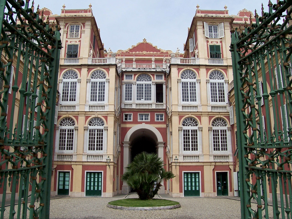 Palazzo Reale a Genova.